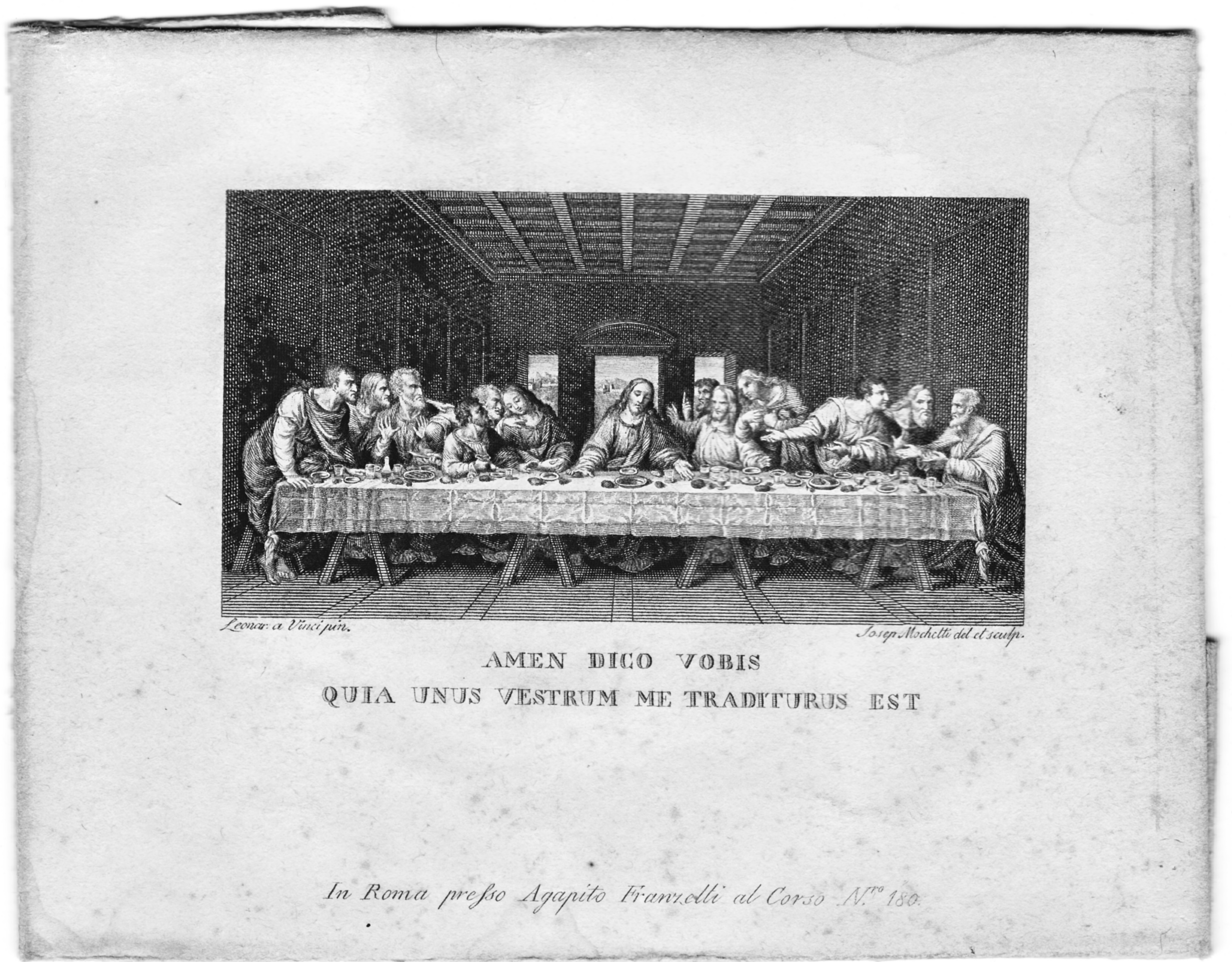 Grabado Ultima Cena